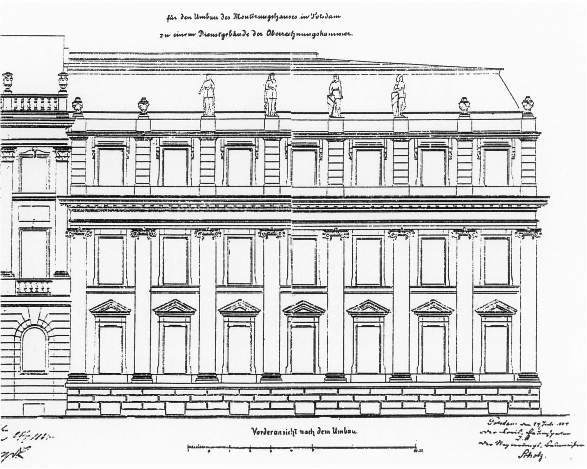 Potsdam, Nordfassade des Montierungshauses am Kanal, Entwurf Georg Christian Unger 1785, Umbauplan von 1884